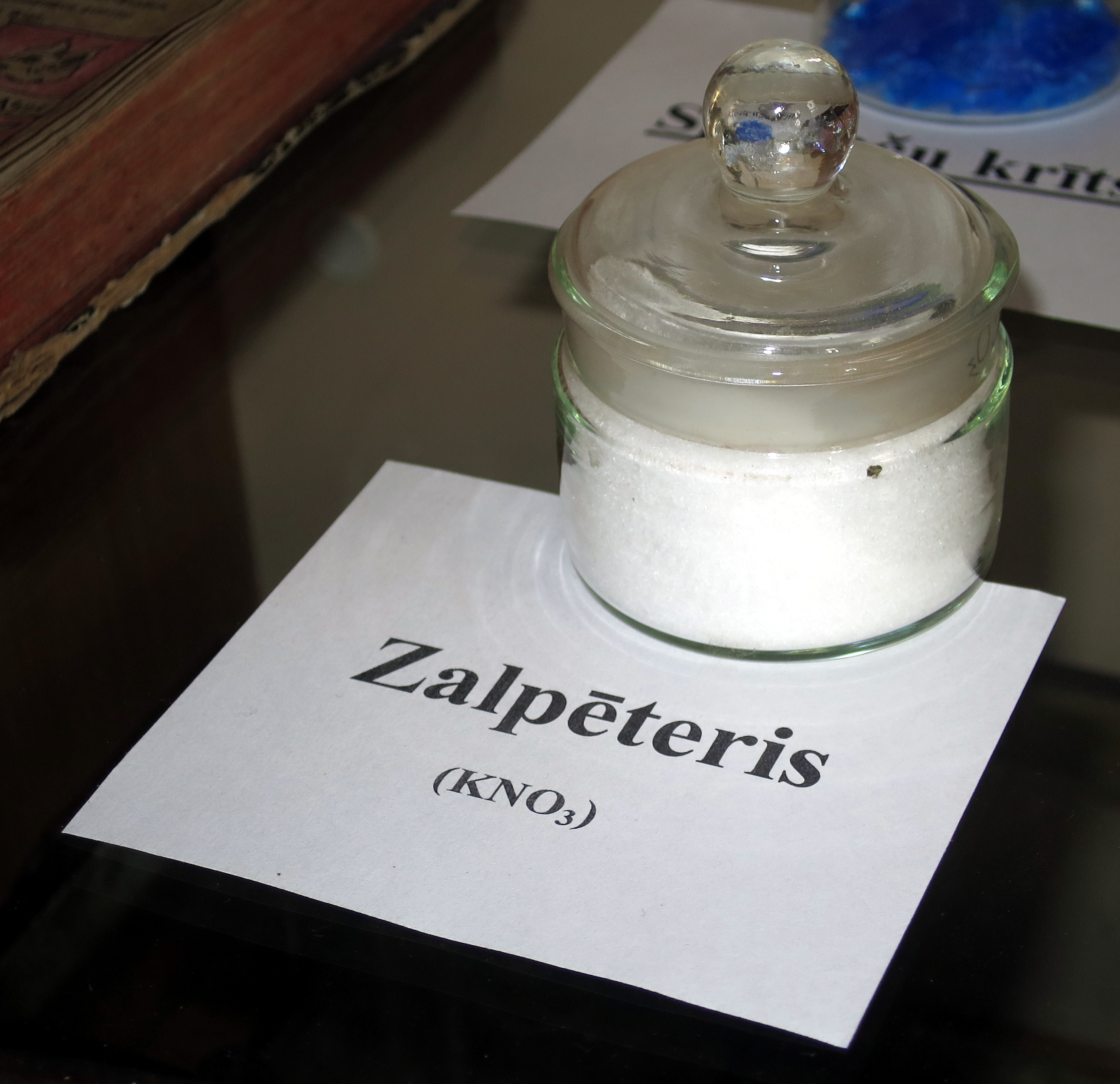 Salpetra paraugs Latvijas ķīmijas vēstures muzejā